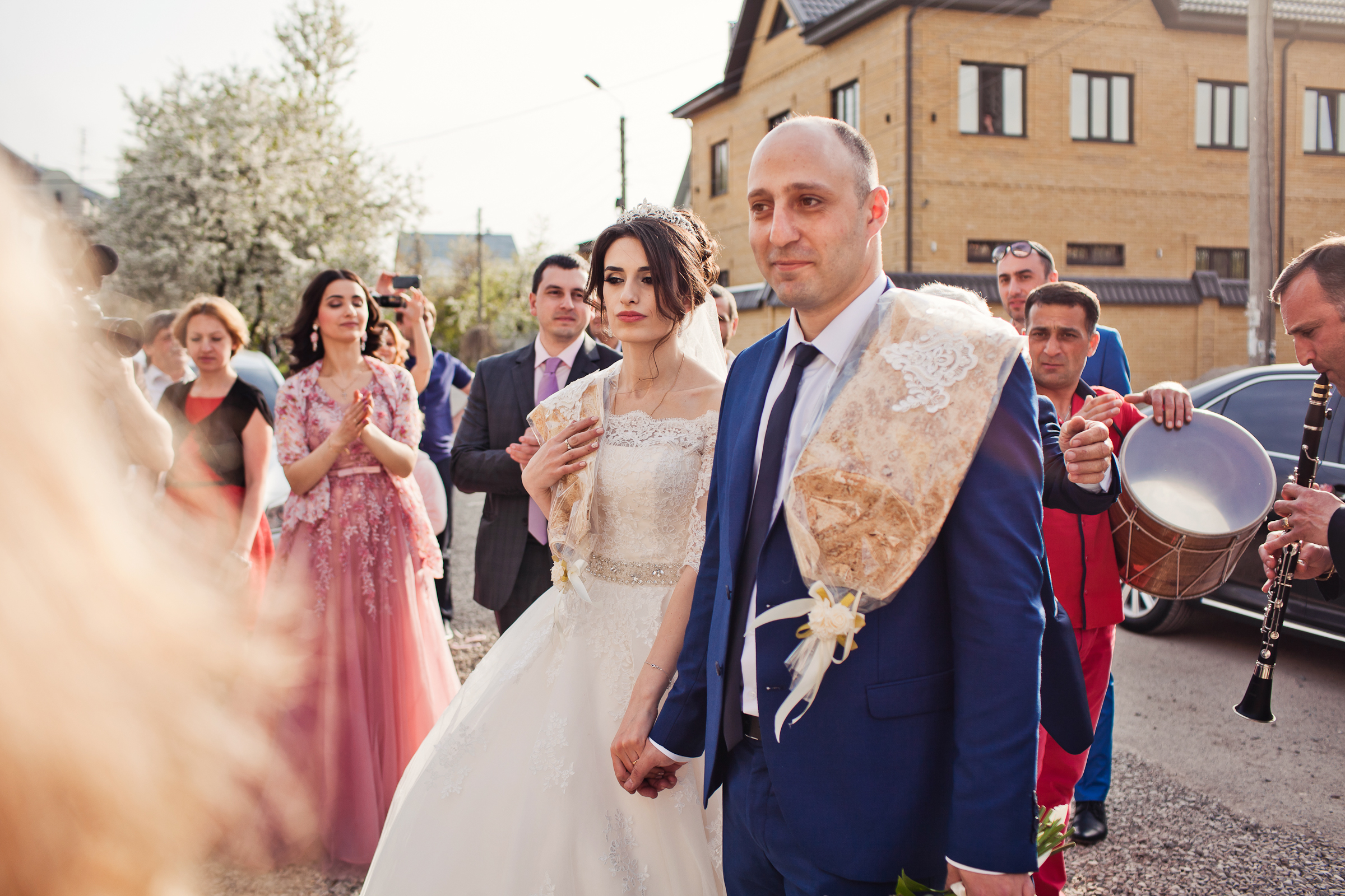 армянская свадьба в России